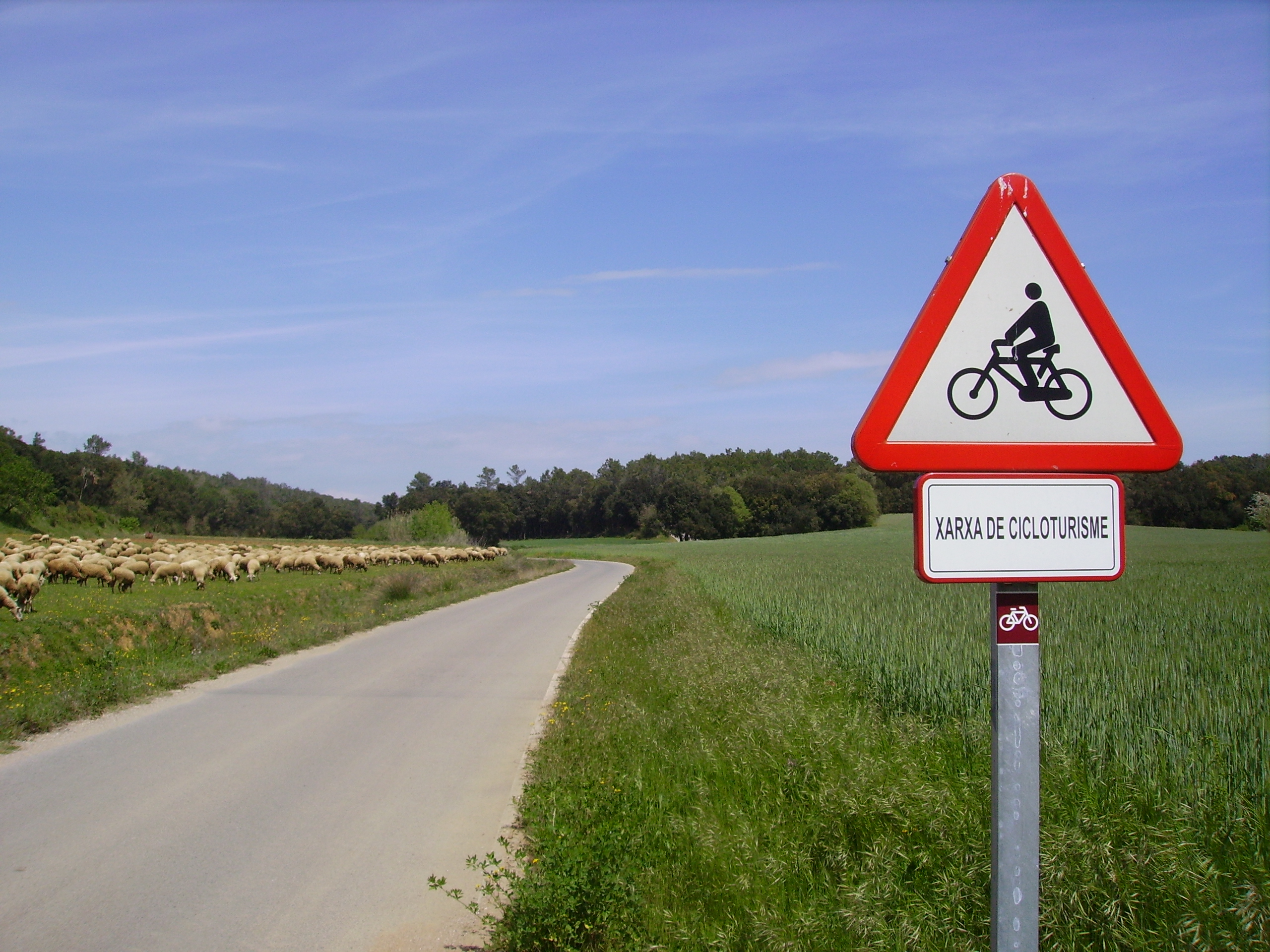 Cicloturisme al Baix Empordà (Catalunya).